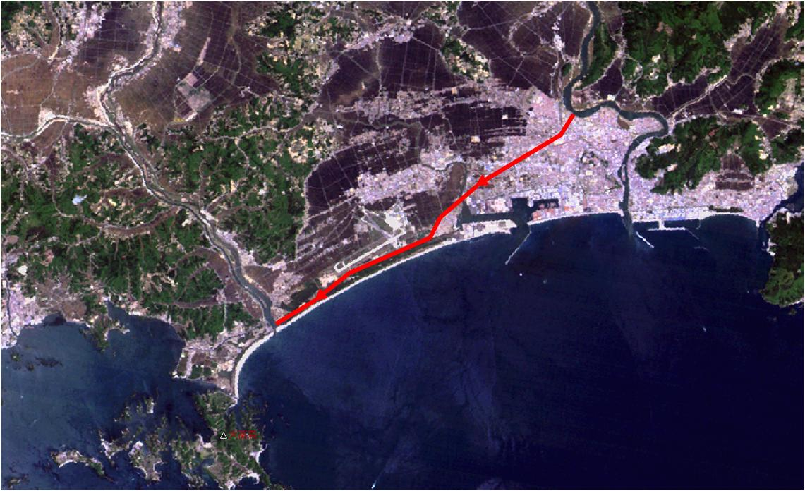 Kitakami canal in Ishinomaki, Japan